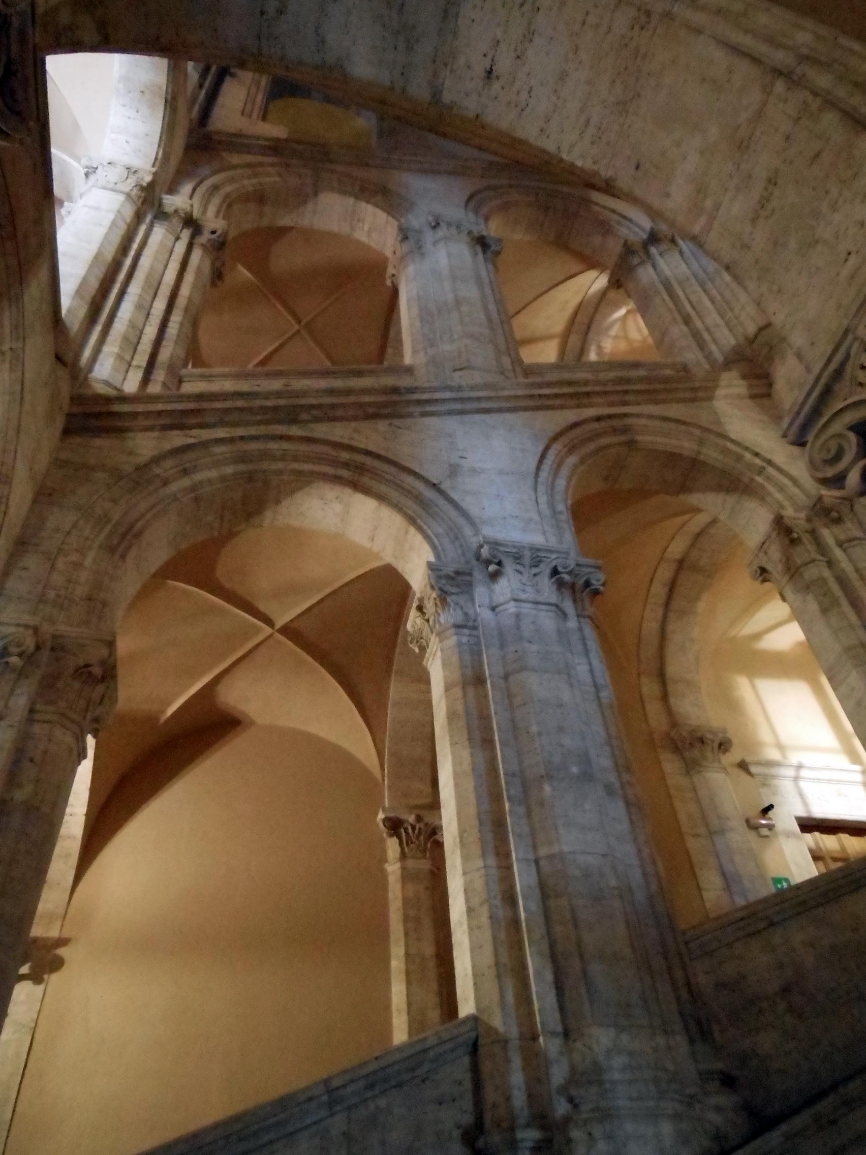 Roma, palazzo Venezia, scala dall'ingresso su via del Plebiscito